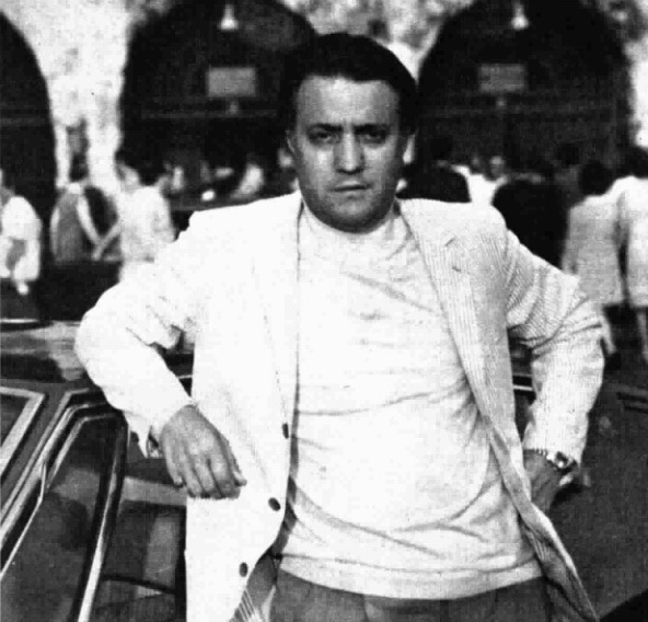 Italian operatic baritone Piero Cappuccilli